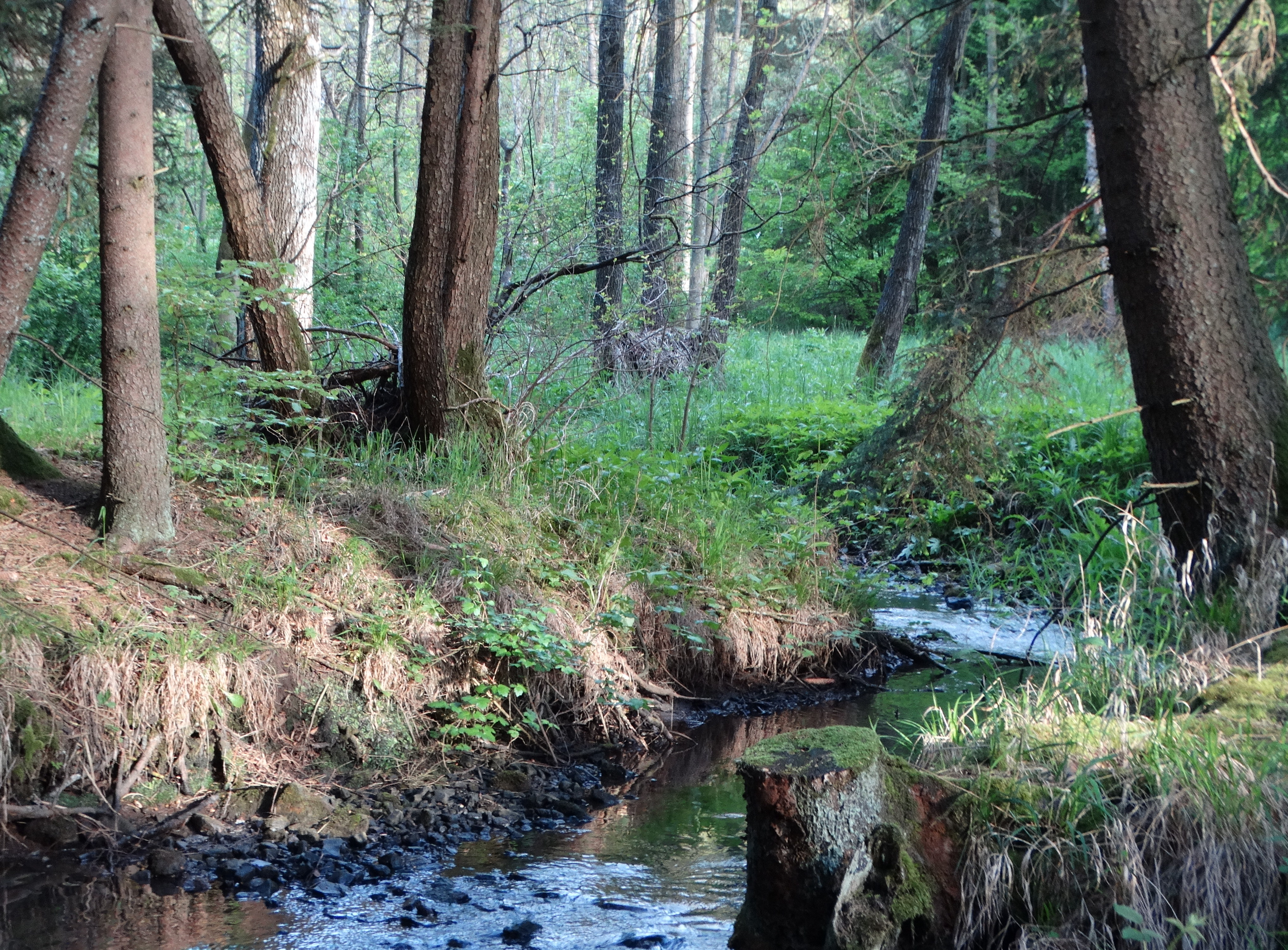 Das Bild zeigt den kleinen Bachlauf Baunach im Bundorfer Forst im Naturschutzgebiet Haßberge.